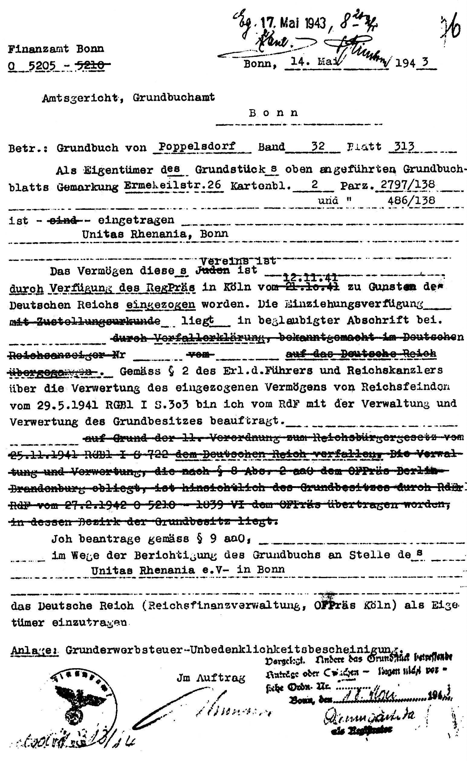 Anweisung des Finanzamtes an das Grundbuchamt, das Deutsche Reich als Eigentümer einzutragen, 14. Mai 1943. Original Amtsgericht Bonn, Grundbuchamt.